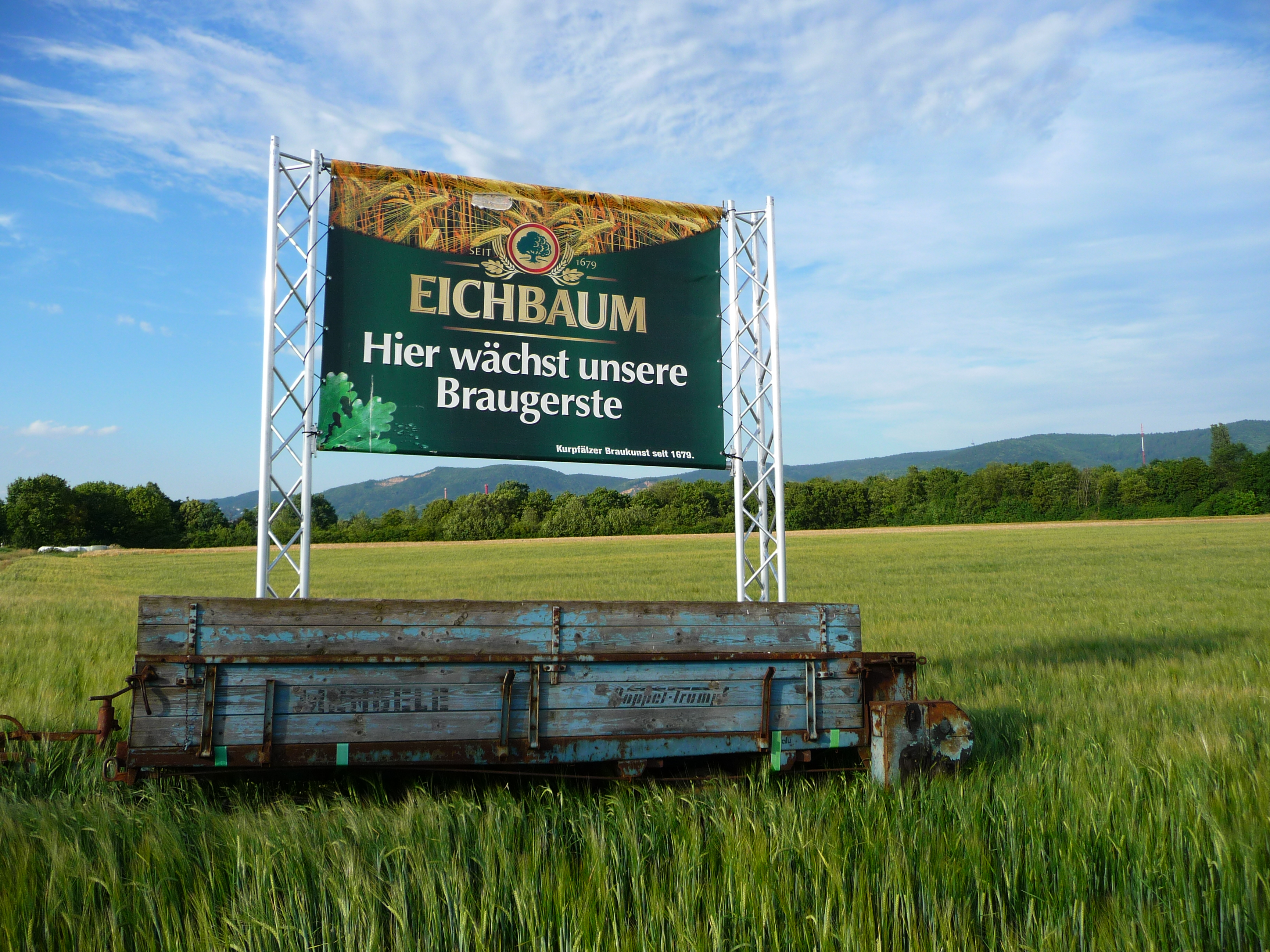 Werbeschild der Eichbaum-Brauerei: Bezug von Braugerste von regionalen Anbietern in der Kurpfalz (hier: Feld in Heidelberg-Wieblingen)